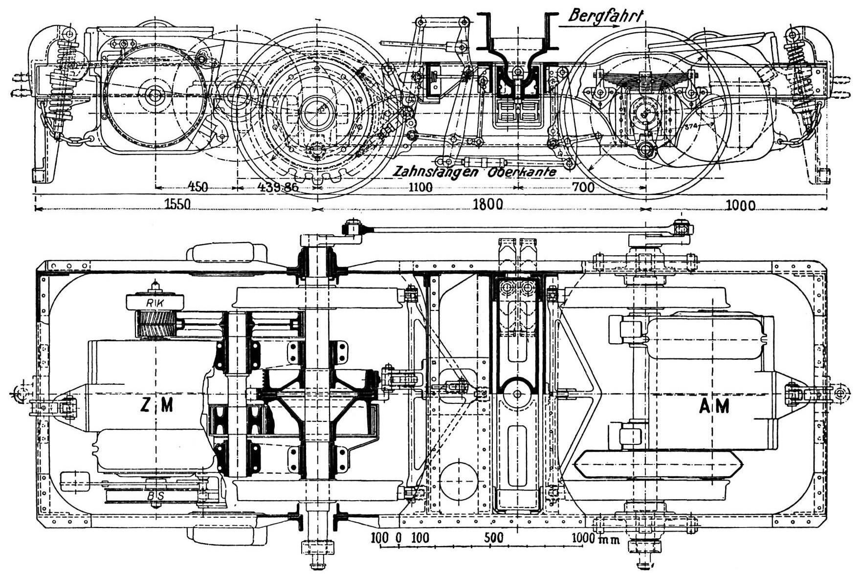 Zeichnung des Drehgetelles eines meterspur Motorwagen BCFeh 4/4 1–3 mit gemischtem Adhäsions- und Zahnradantrieb der ehemaligen Monthey–Champéry–Morgins-Bahn (MCM), heute Transports Publics du Chablais (TPC).